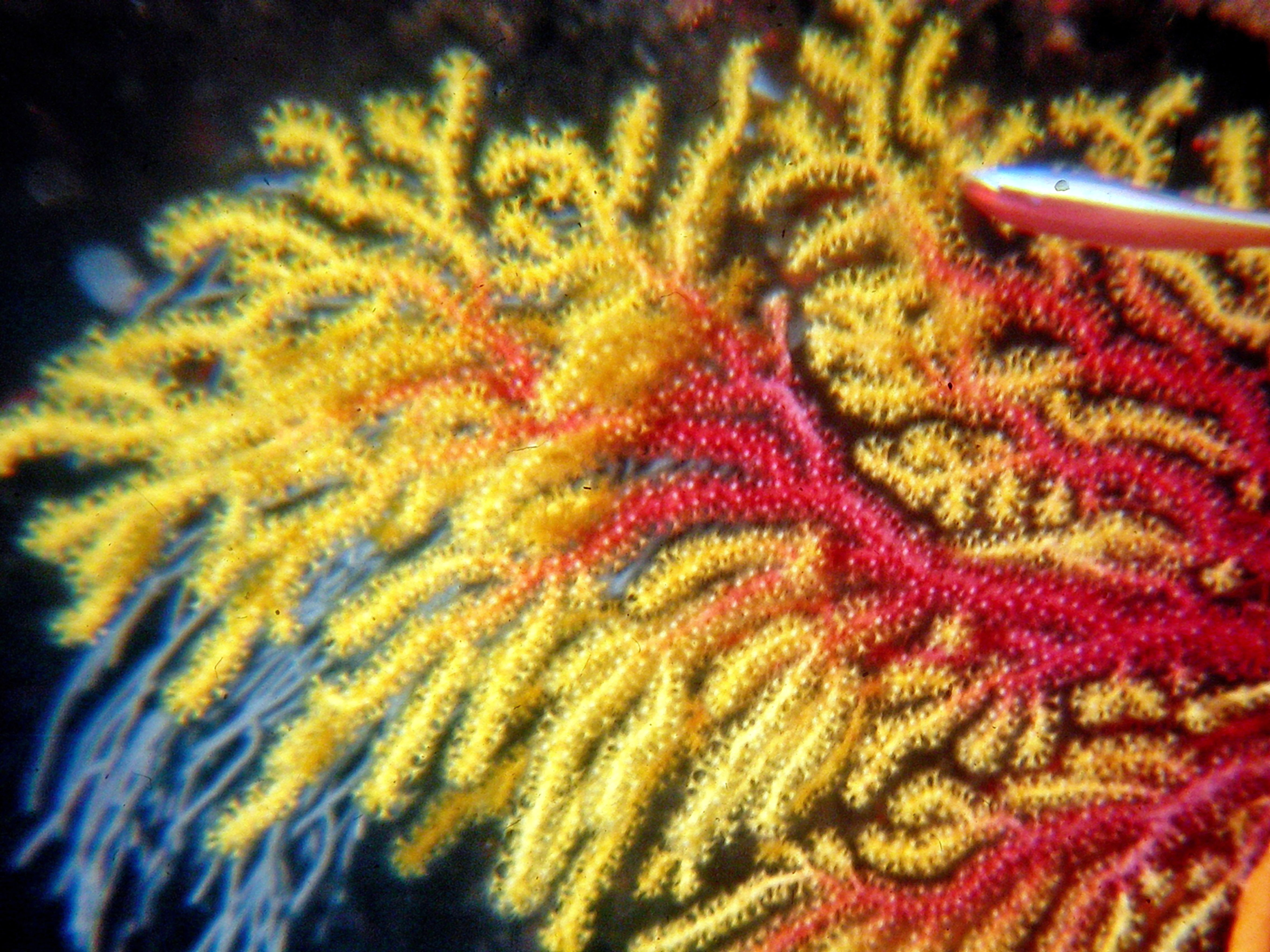 Gorgone méditerranéenne